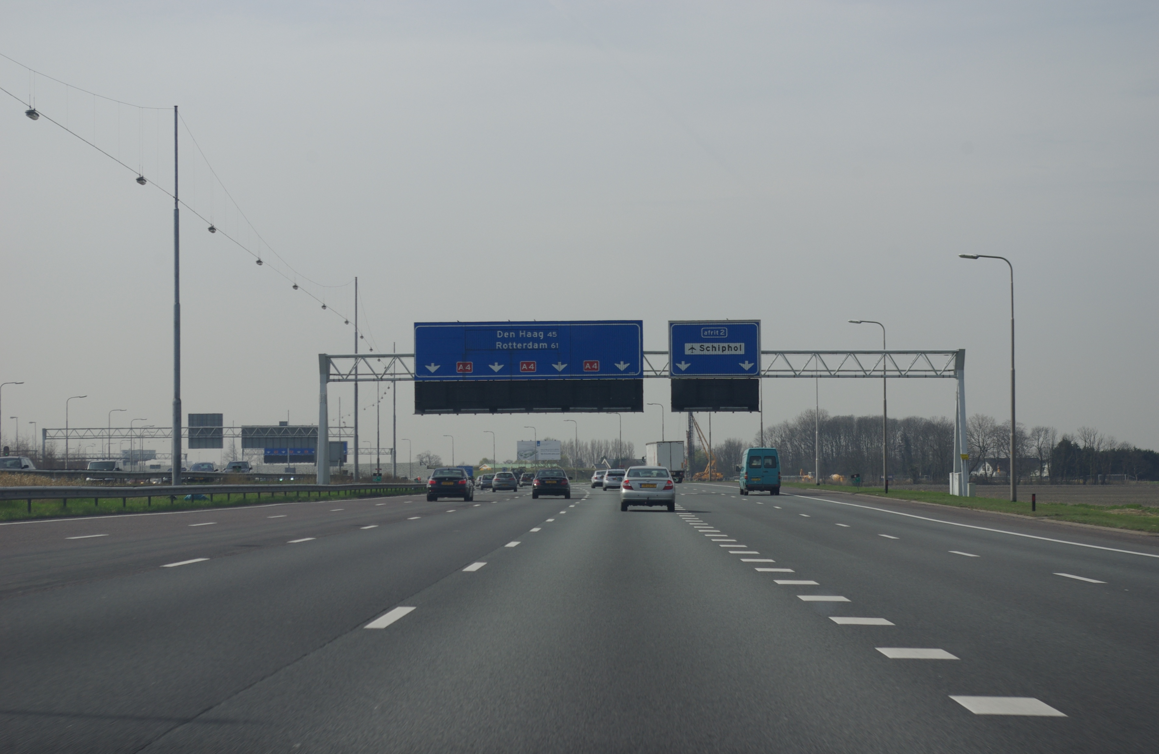 Rijksweg 4, richting Amsterdam-Den Haag, afrit 2 naar Schiphol